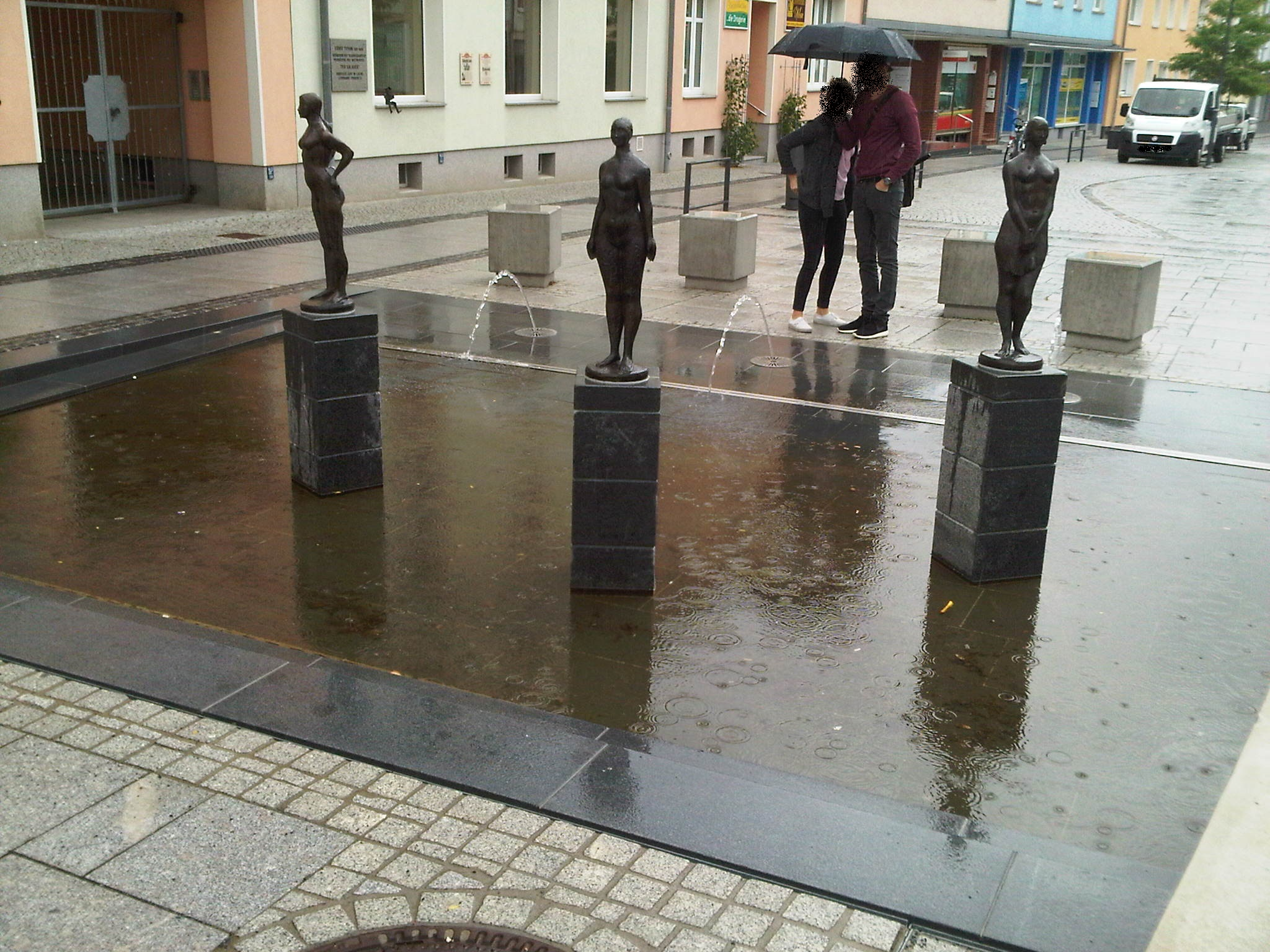 Mädchenbrunnen in Calau, Kleinstadt im Landkreis Oberspreewald-Lausitz in Brandenburg